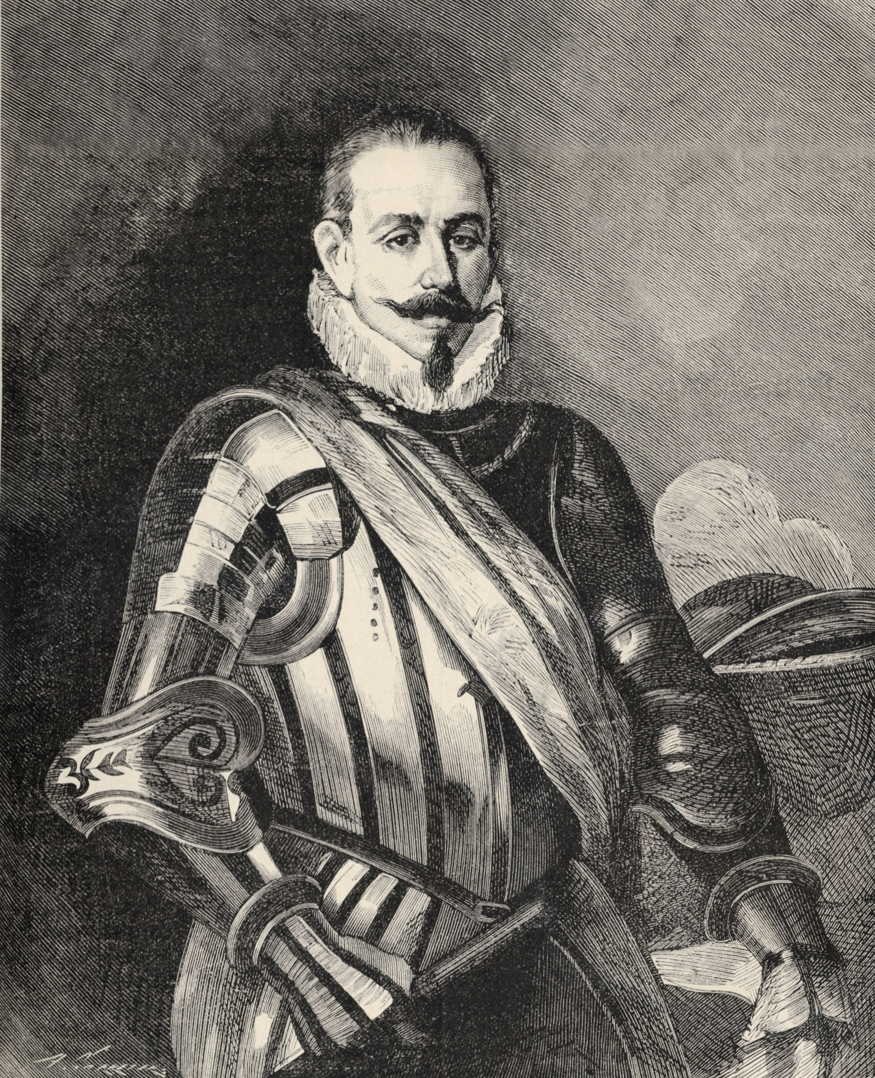 Pedro de Valdivia (Villanueva de la Serena, Badajoz, España, 1497 — † Tucapel, Chile, 24 de diciembre de 1553) fue un militar y conquistador español de origen extremeño.